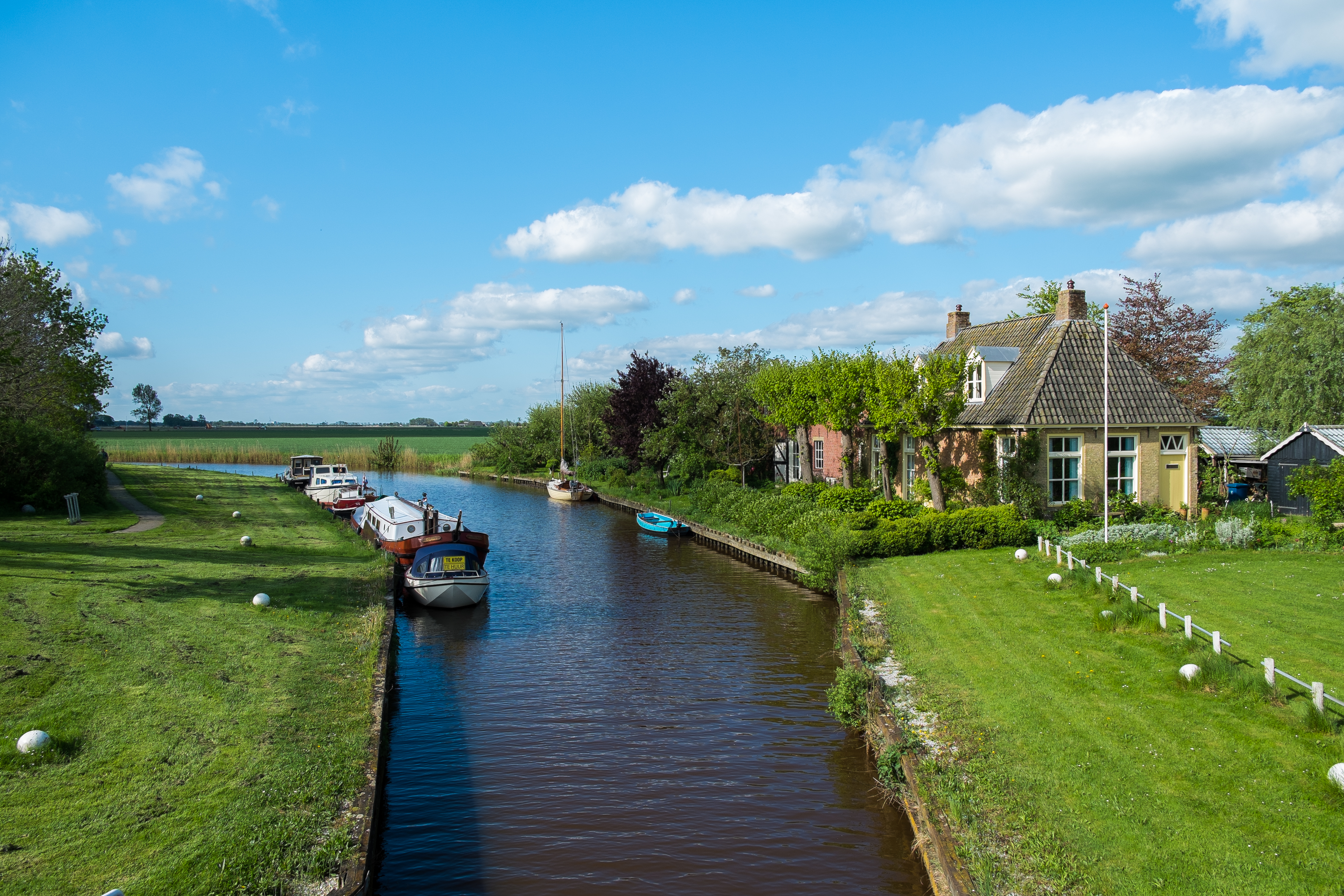 De Lauwers ten zuiden van de oude sluis van Munnekezijl. Links Het Eiland of De Schans; een gesloopt deel van Munnekezijl, dat nu een recreatieve functie heeft.